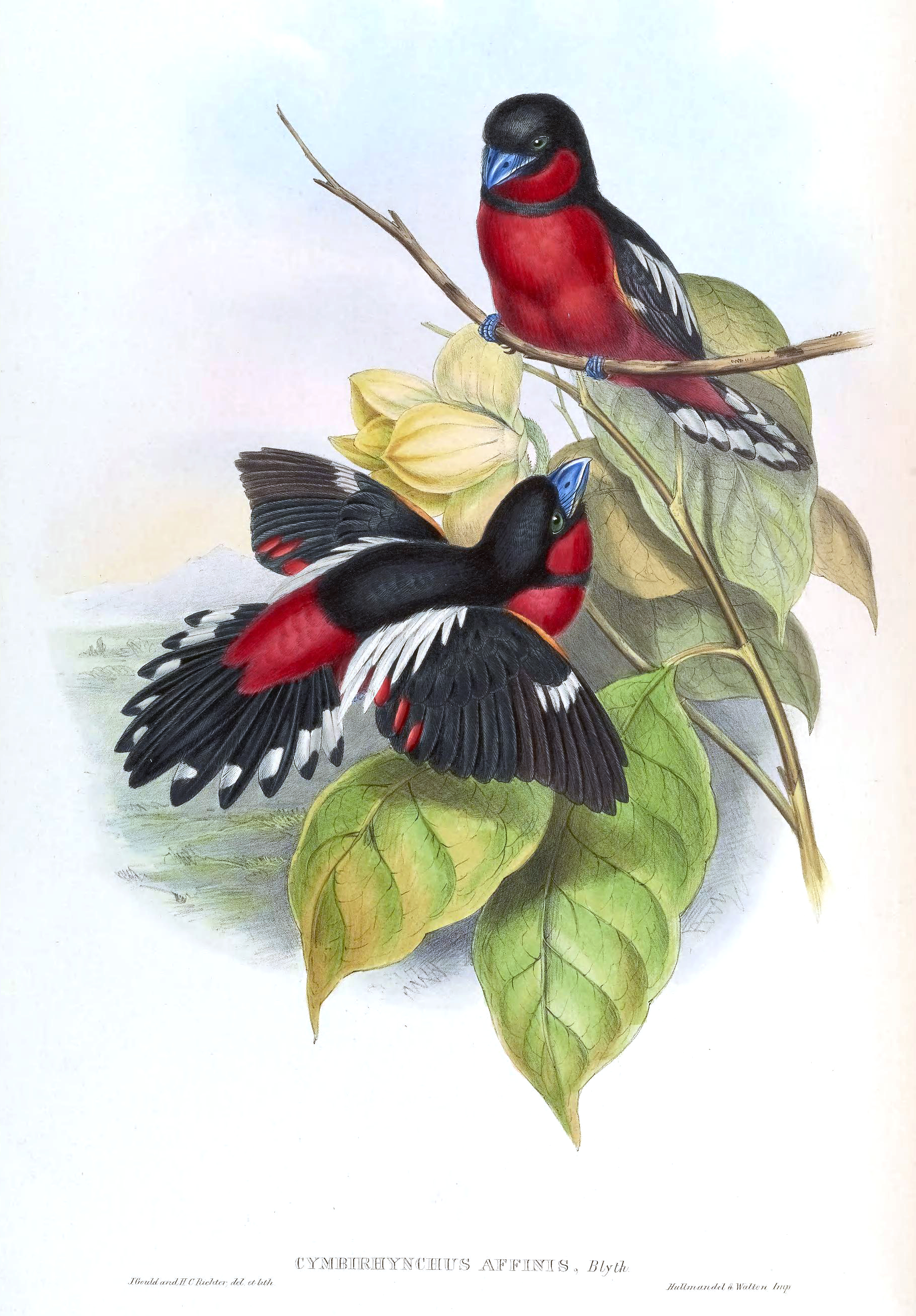 Cymbirhynchus affinis = Now Cymbirhynchus macrorhynchus affinis